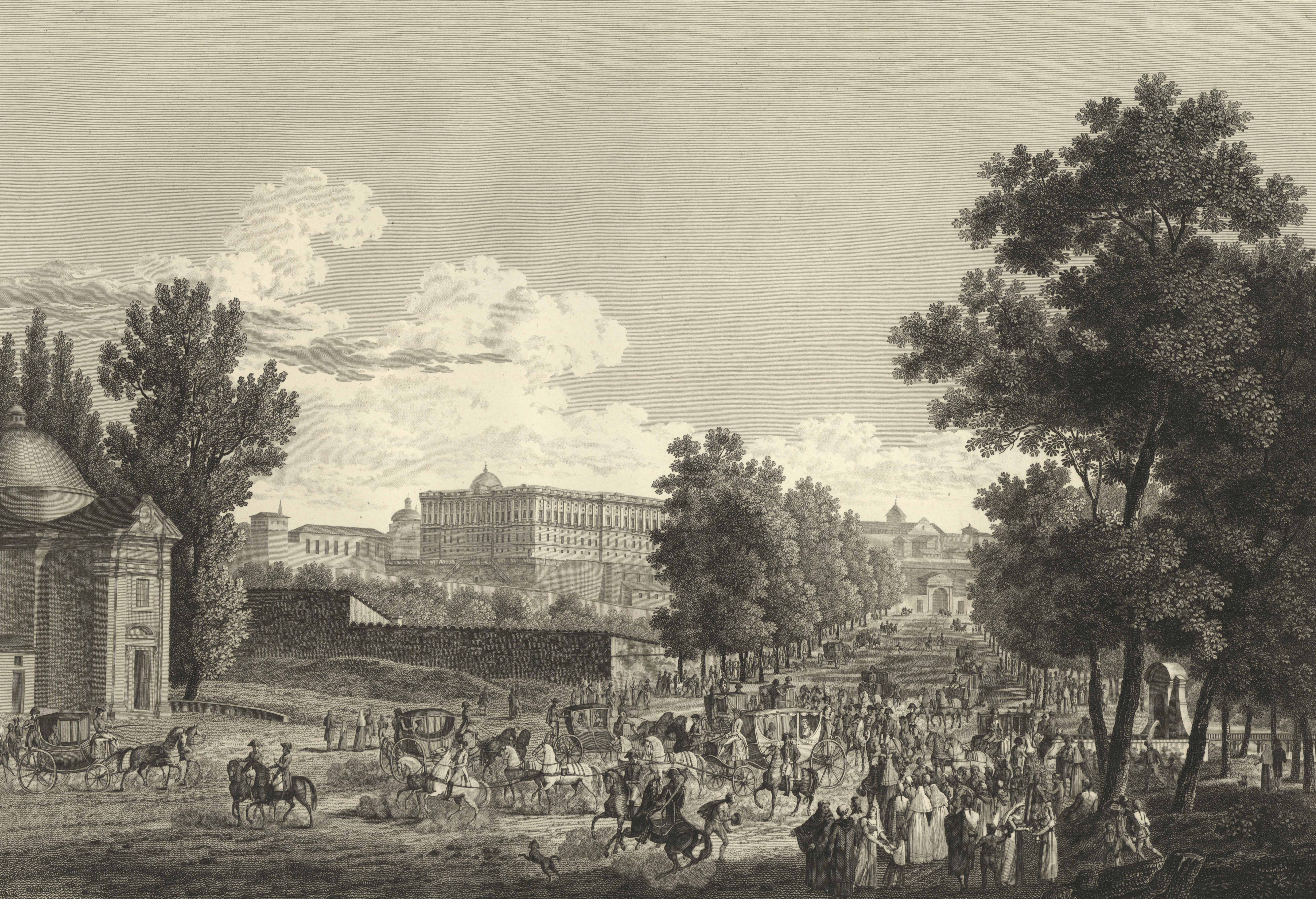 Vista de la Florida en Madrid.